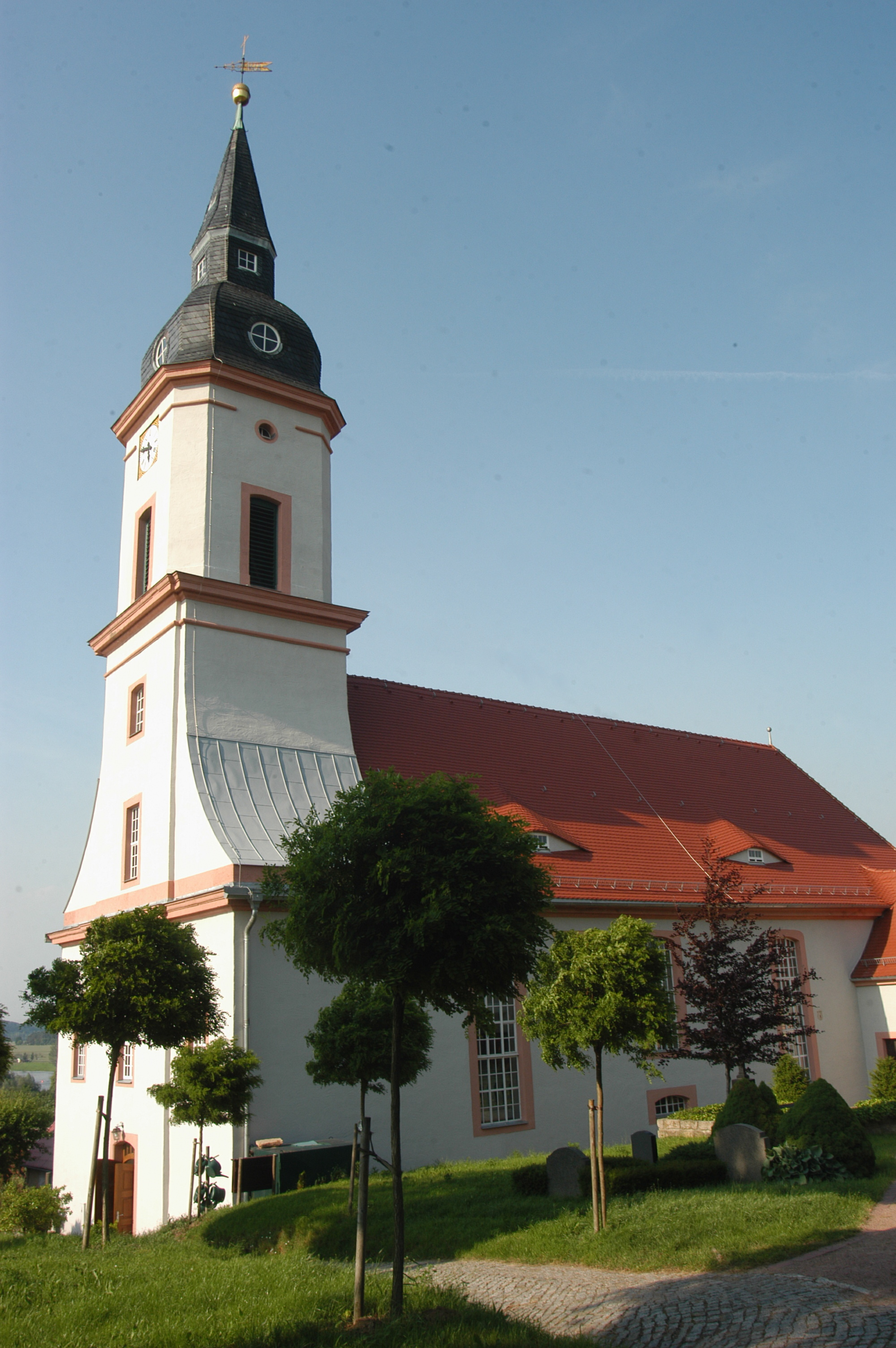 Ev.-Luth. St.Michaeliskirche Zehren